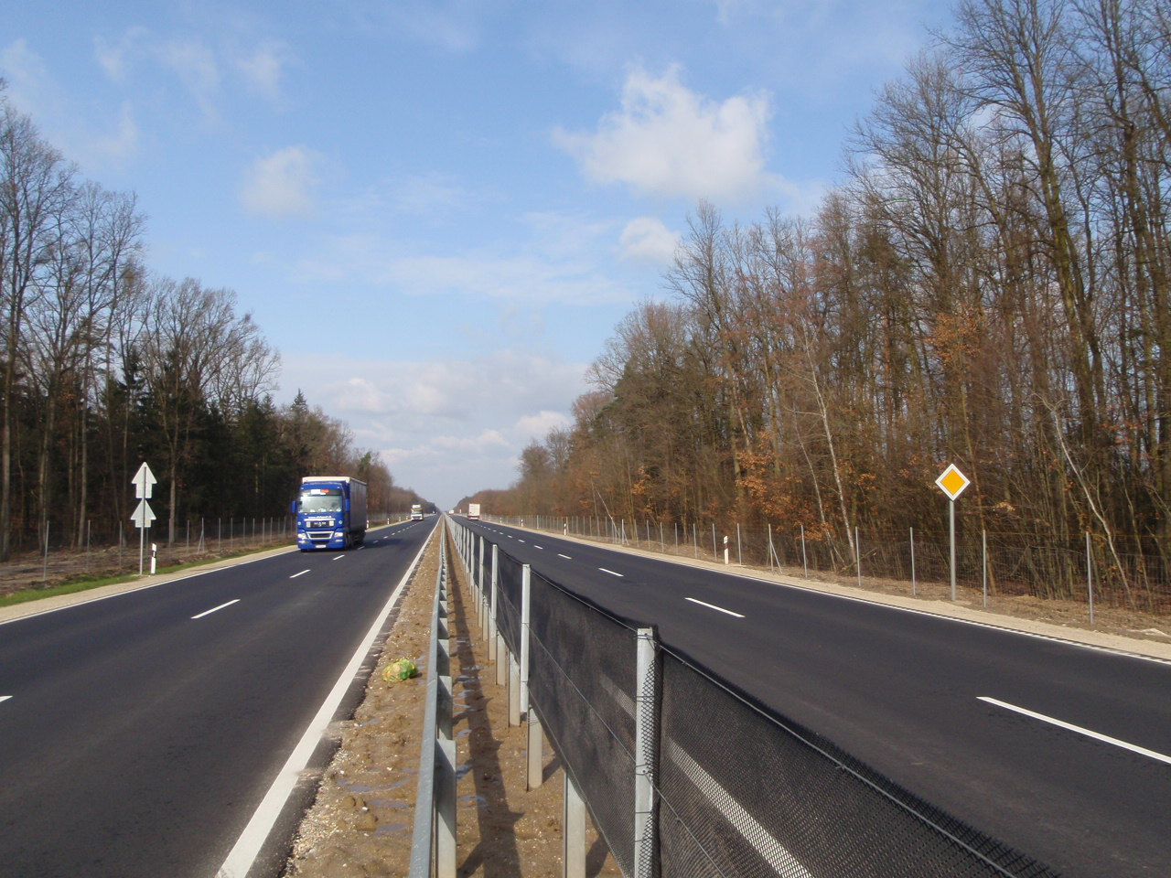 86-os főút 2013. 11.26-án átadott 4 sávos szakasza Körmend-Egyházasrádóc között